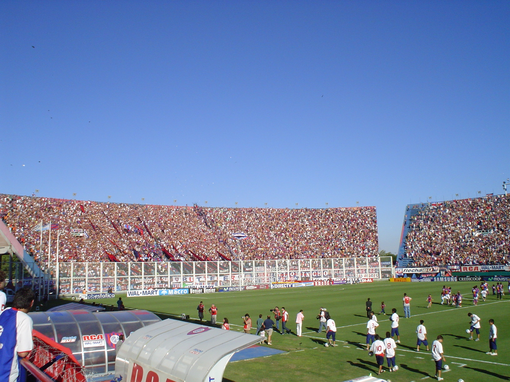 Estadio de San Lorenzo de Almagro, en Buenos Aires, Argentina